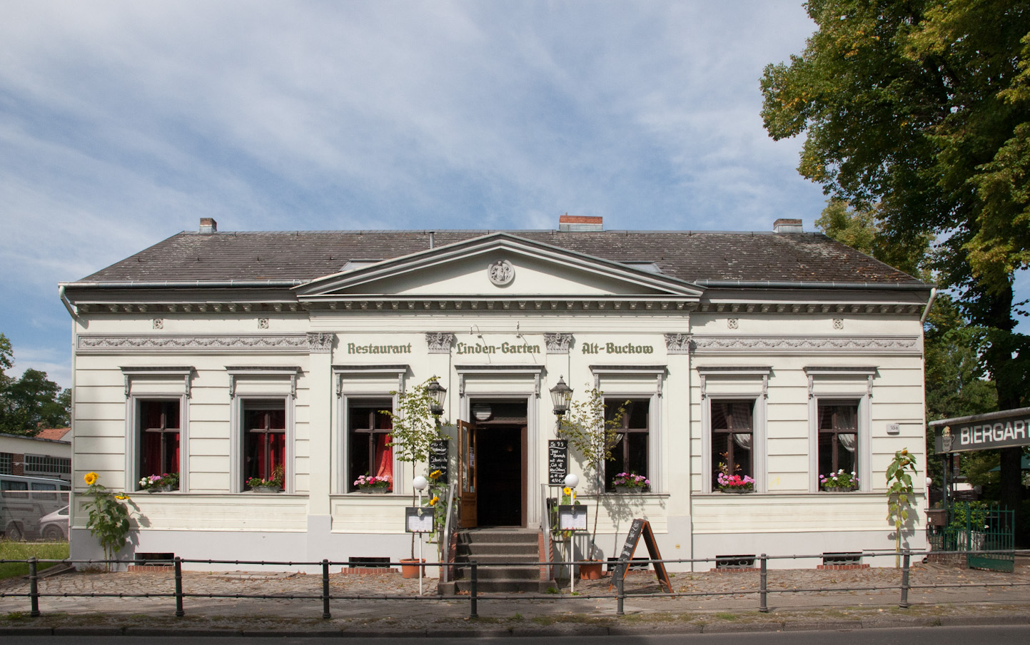 Baudenkmal Alt-Buckow 15 a, Gaststaette